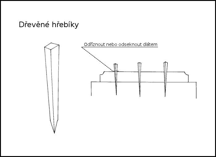 Dřěvěné hřebíky - ukázka spojení